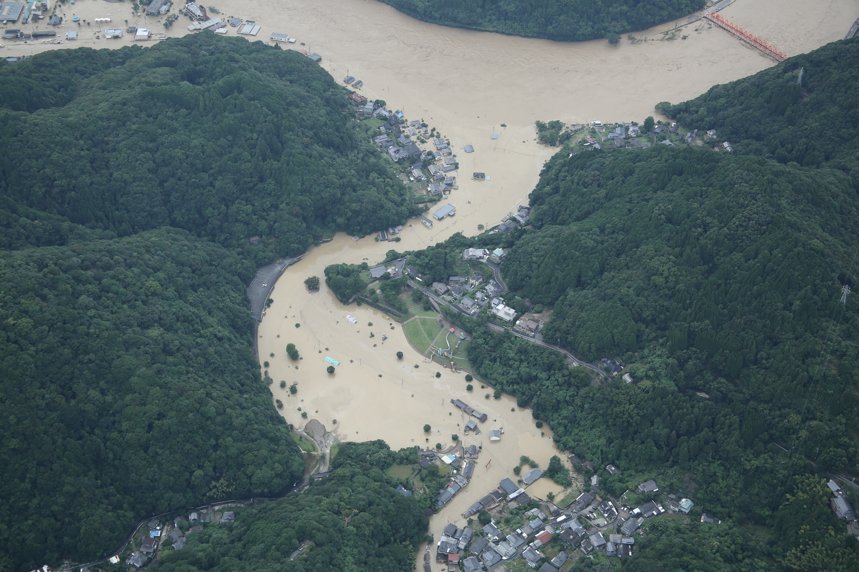 令和2年（2020年）7月3日からの大雨を受けて国土地理院によって行われた現地調査で撮影された空撮写真[1]